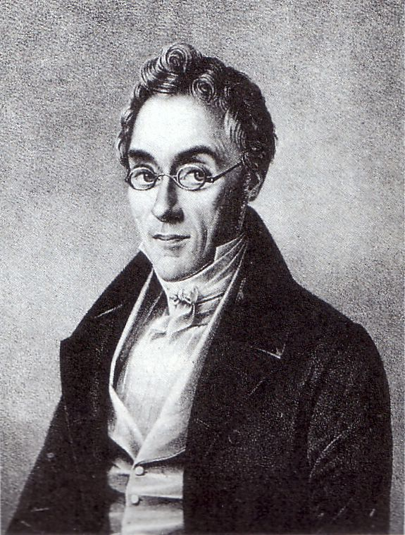 Summary Bildbeschreibung: Friedrich List, Litografie Zeichner: F. Bils Datum: 1838